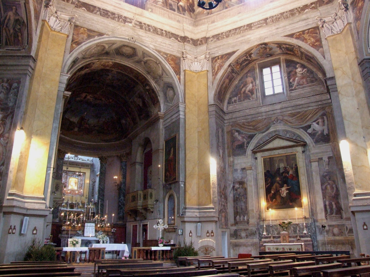 Chiesa di Santa Maria del Quartiere, Parma, Italy (Emilia Romagna)-Church of Santa Maria, Parma, Italy (Interior)